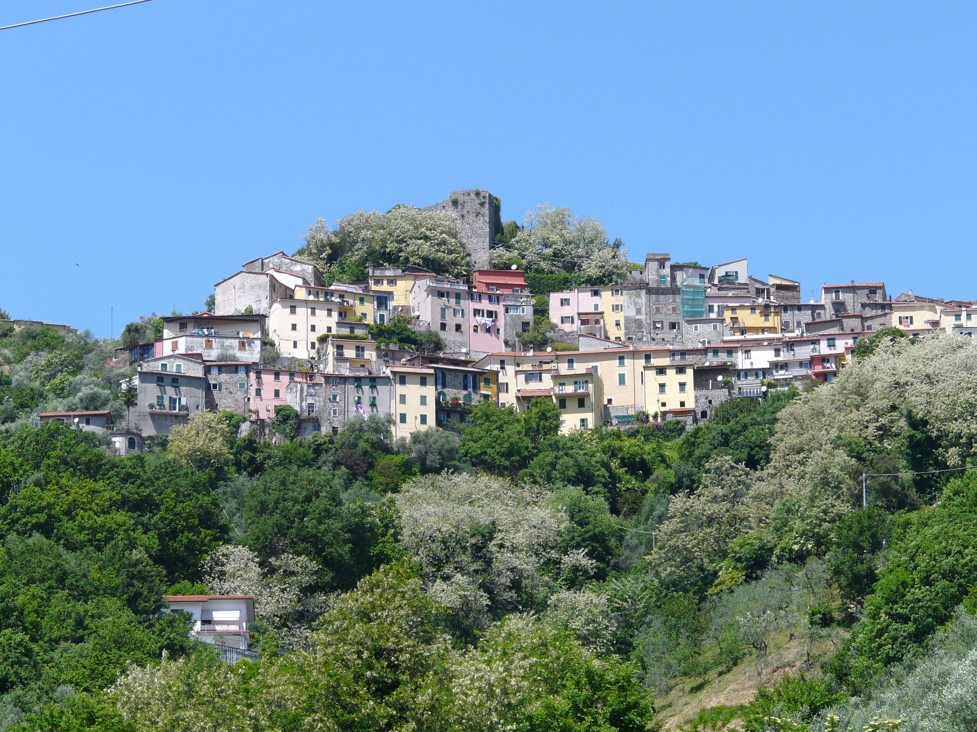 Panorama di Trebiano Magra, Arcola, Liguria, Italia